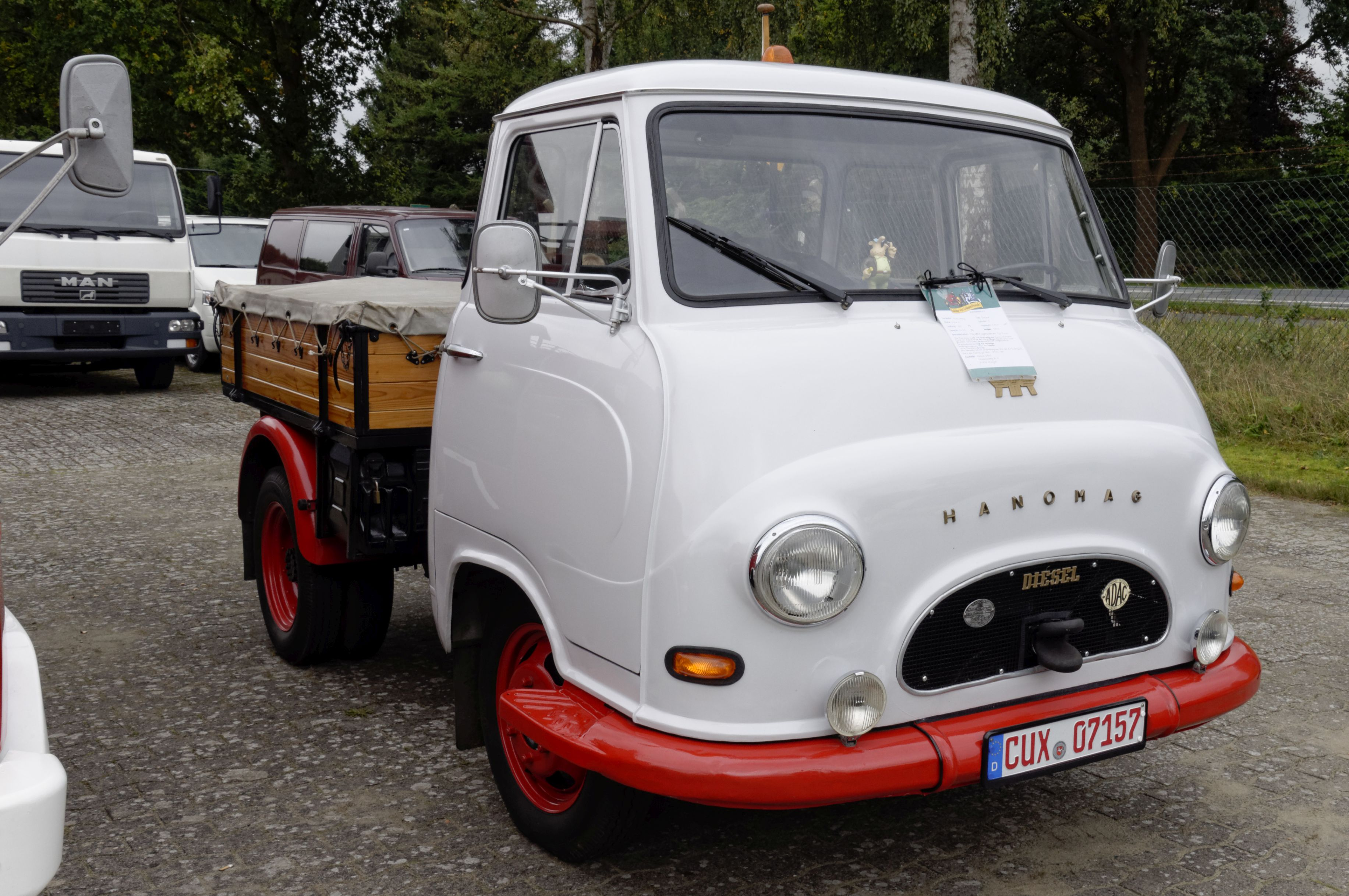 Hechthausen -IG Oldtimer Treffen- 2017